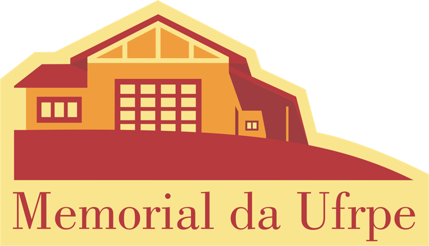 Logomarca institucional do Memorial da UFRPE.